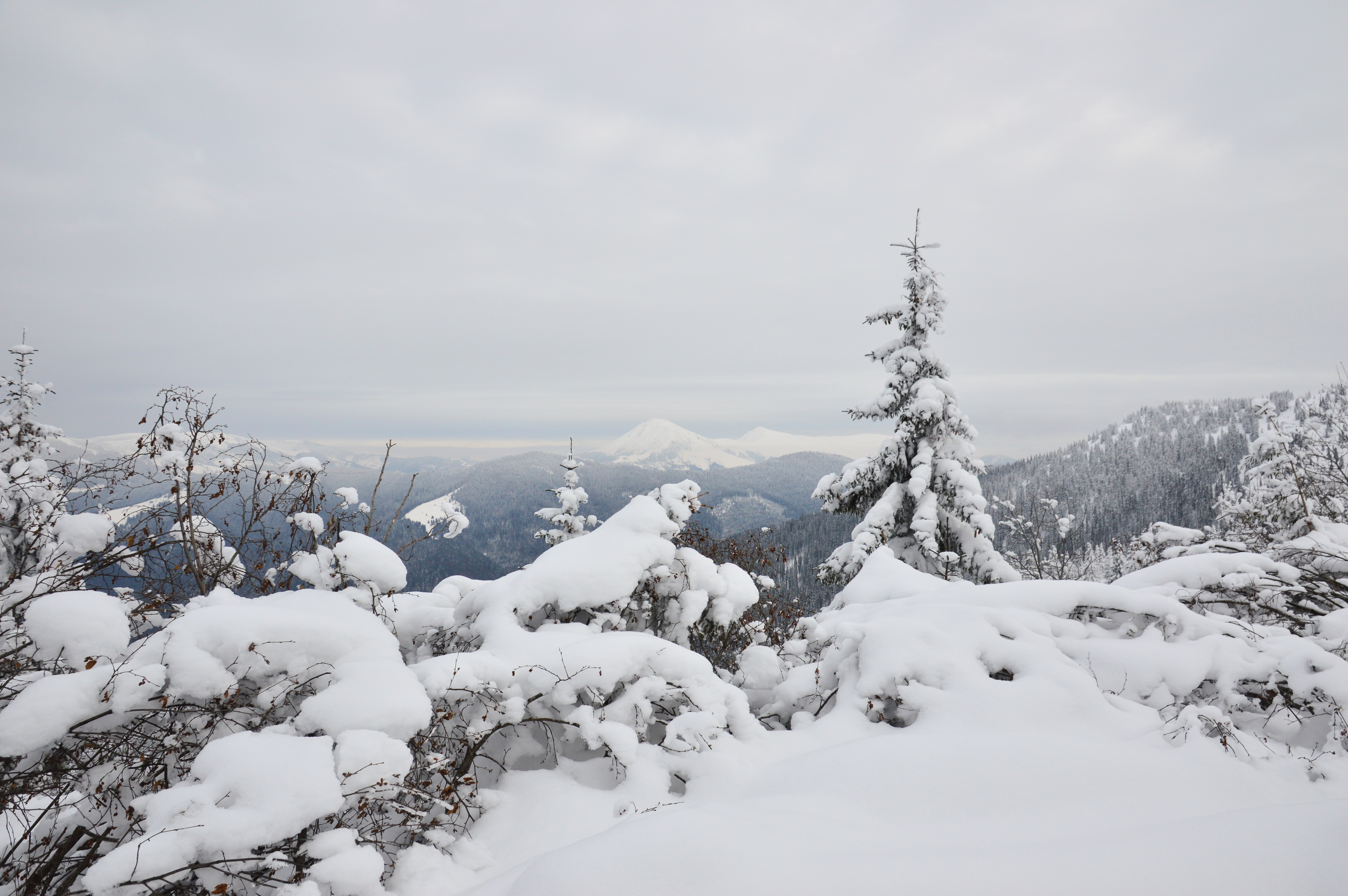 На фоні видно румунську частину Мармароського масиву - г. Феркеу.